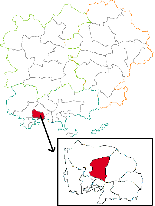 Situation du canton dans la département du Var (83), France